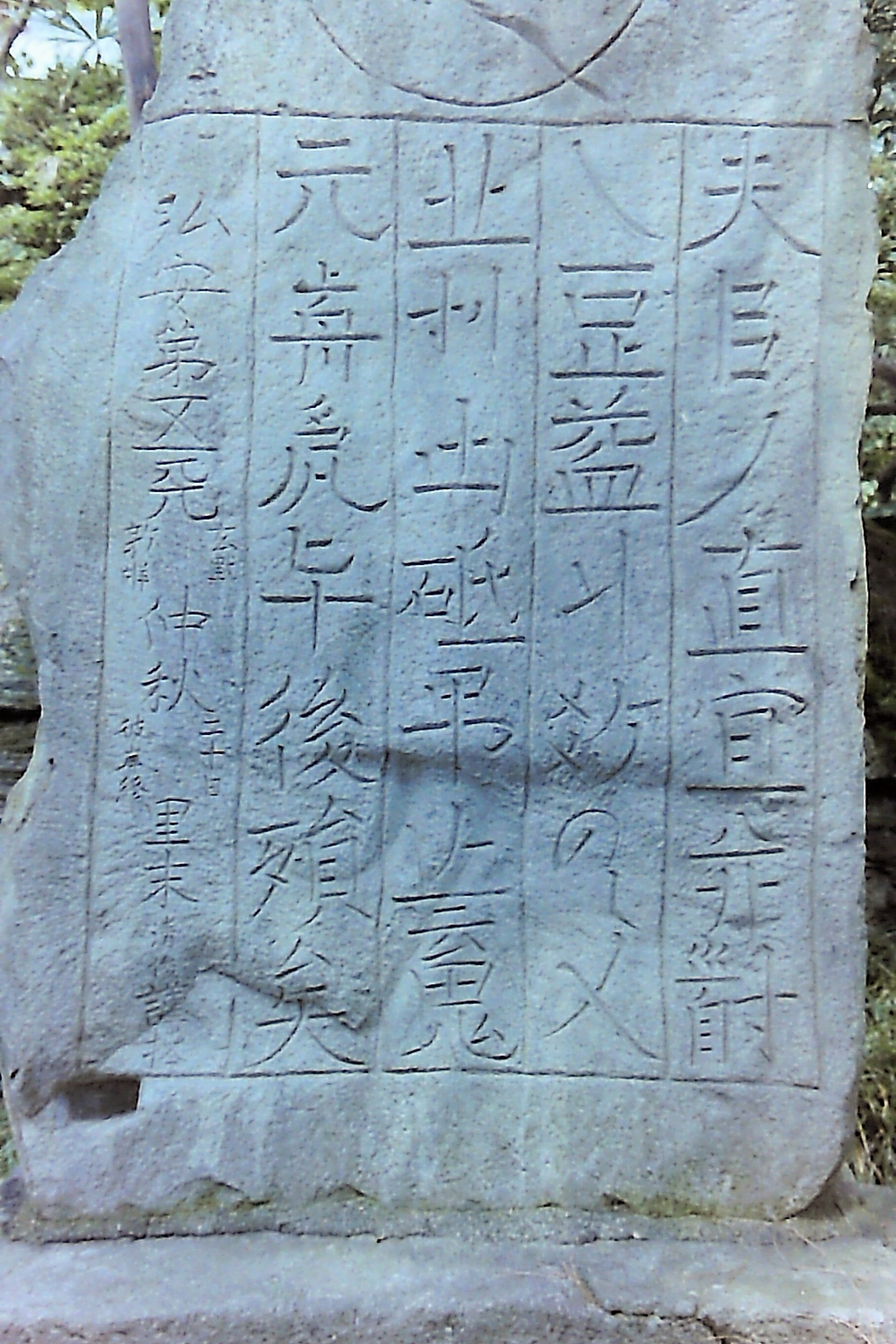 宮城県仙台市宮城野区燕沢の善応寺の蒙古碑